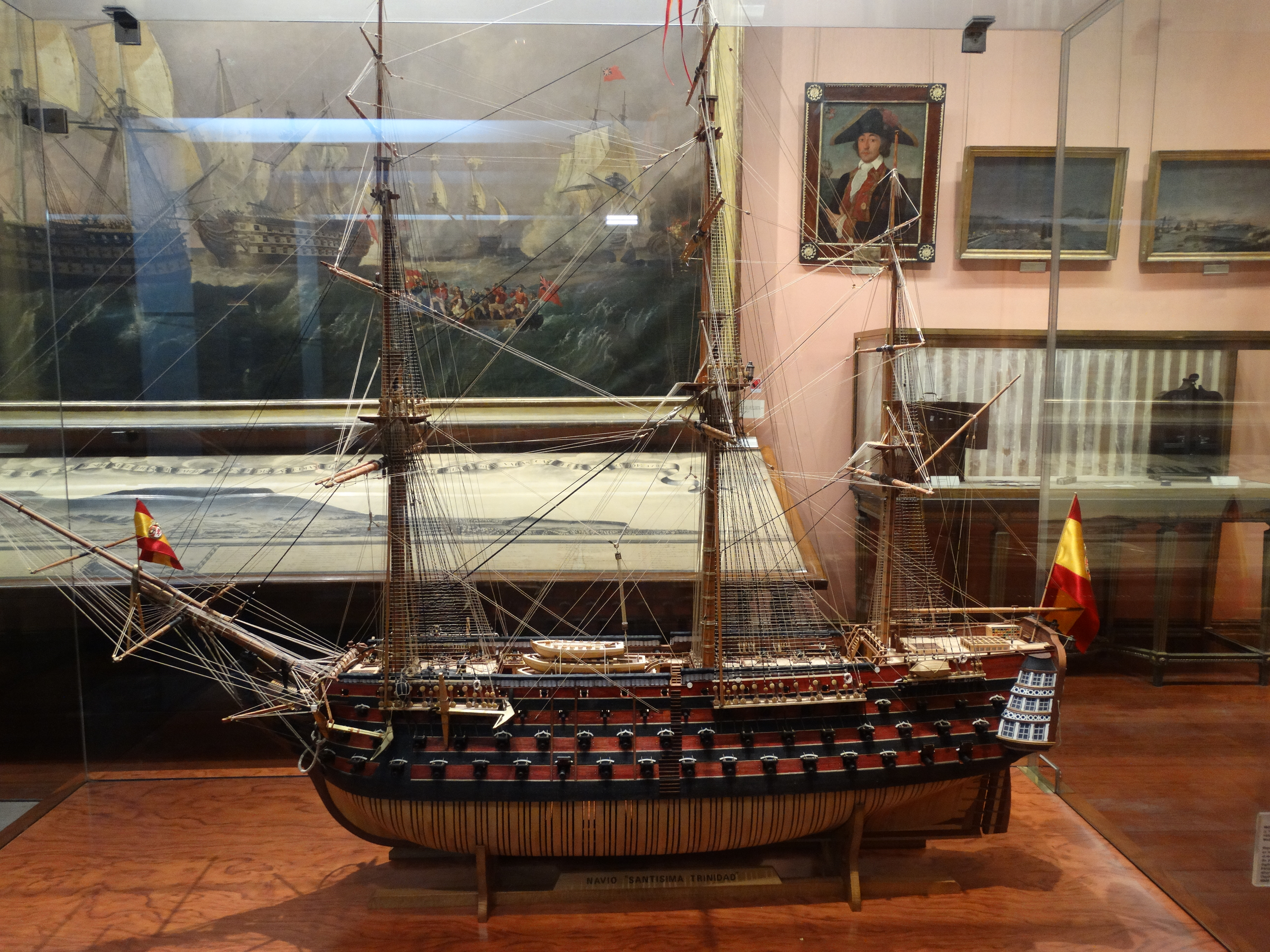 Museo Naval de Madrid, España. Maqueta del navío Santísima Trinidad